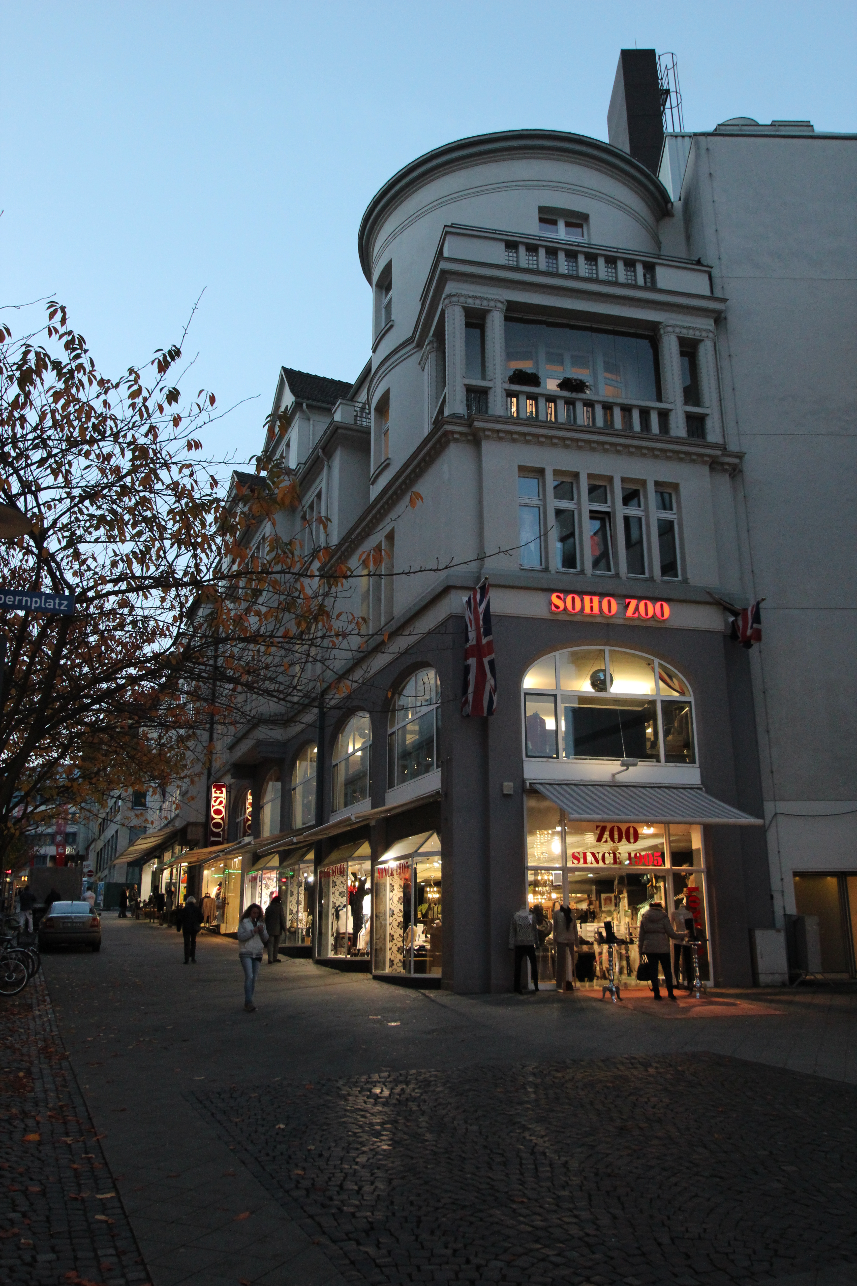 Wohn- und Geschäftsgebäude Opernstraße 2 in Kassel